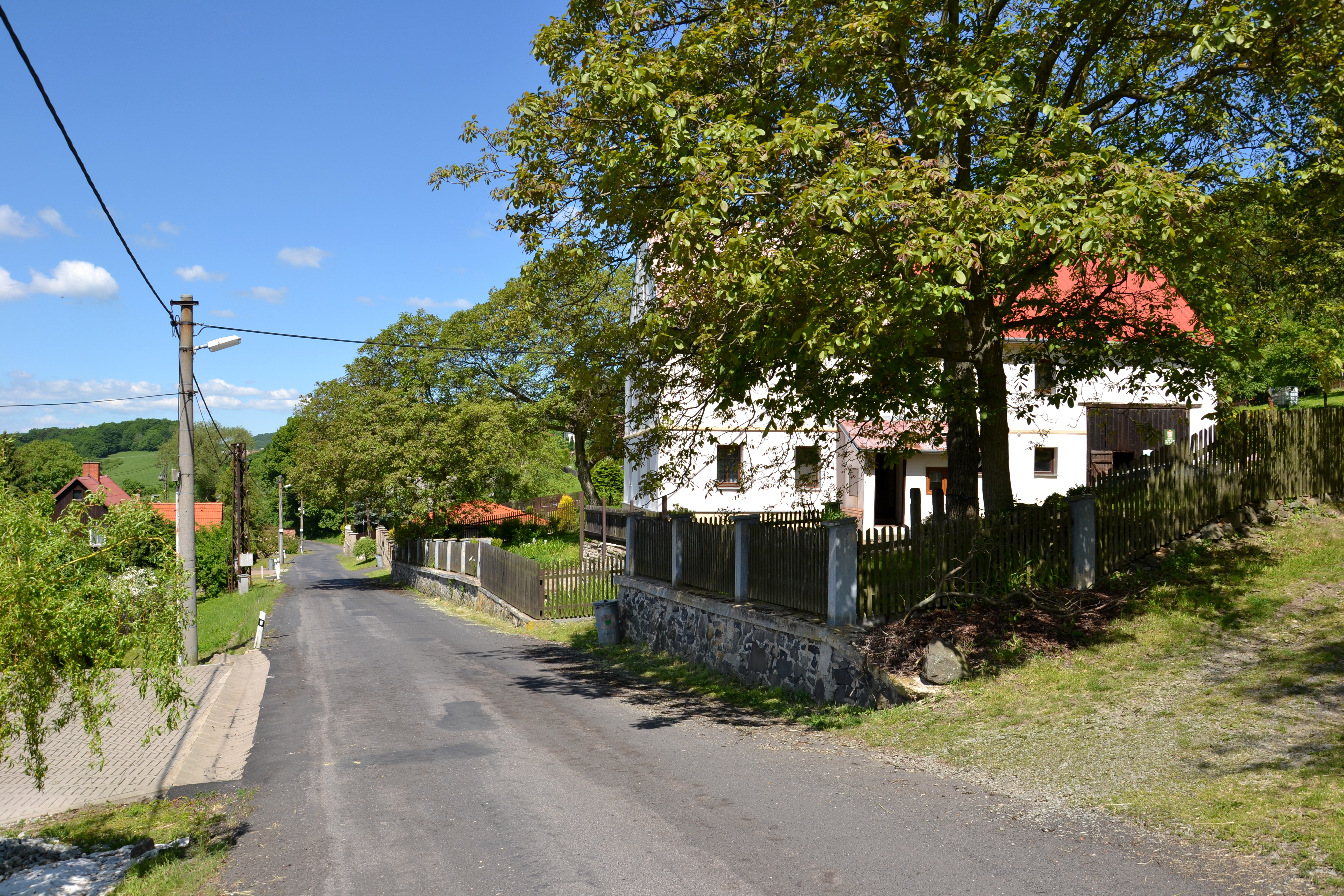 Nová Ves u Pláně – hlavní ulice